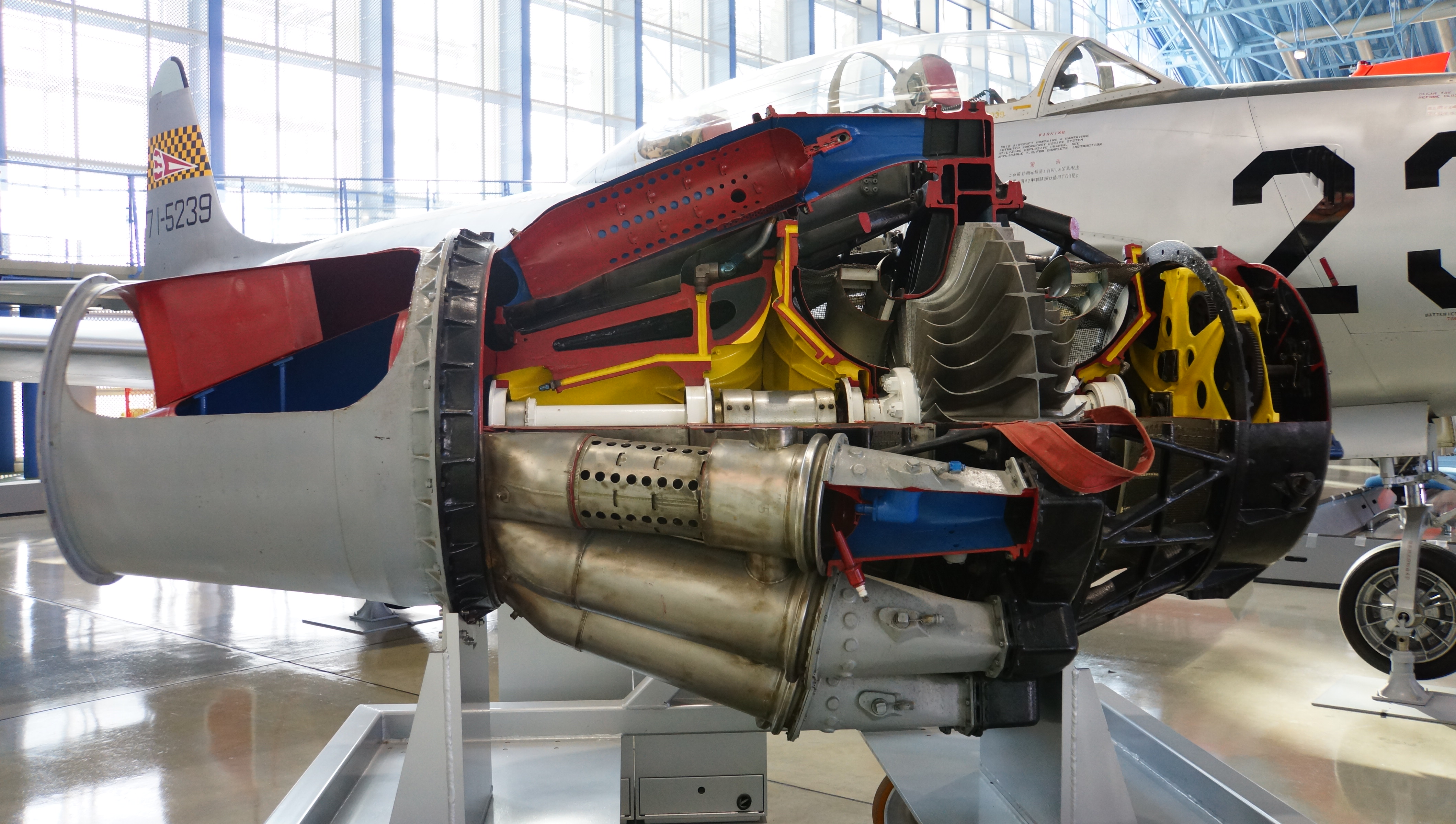 アリソン J33-A-15ターボジェット・エンジン（カットモデル） 右側面。2014年11月24日 航空自衛隊浜松基地広報館内にて。